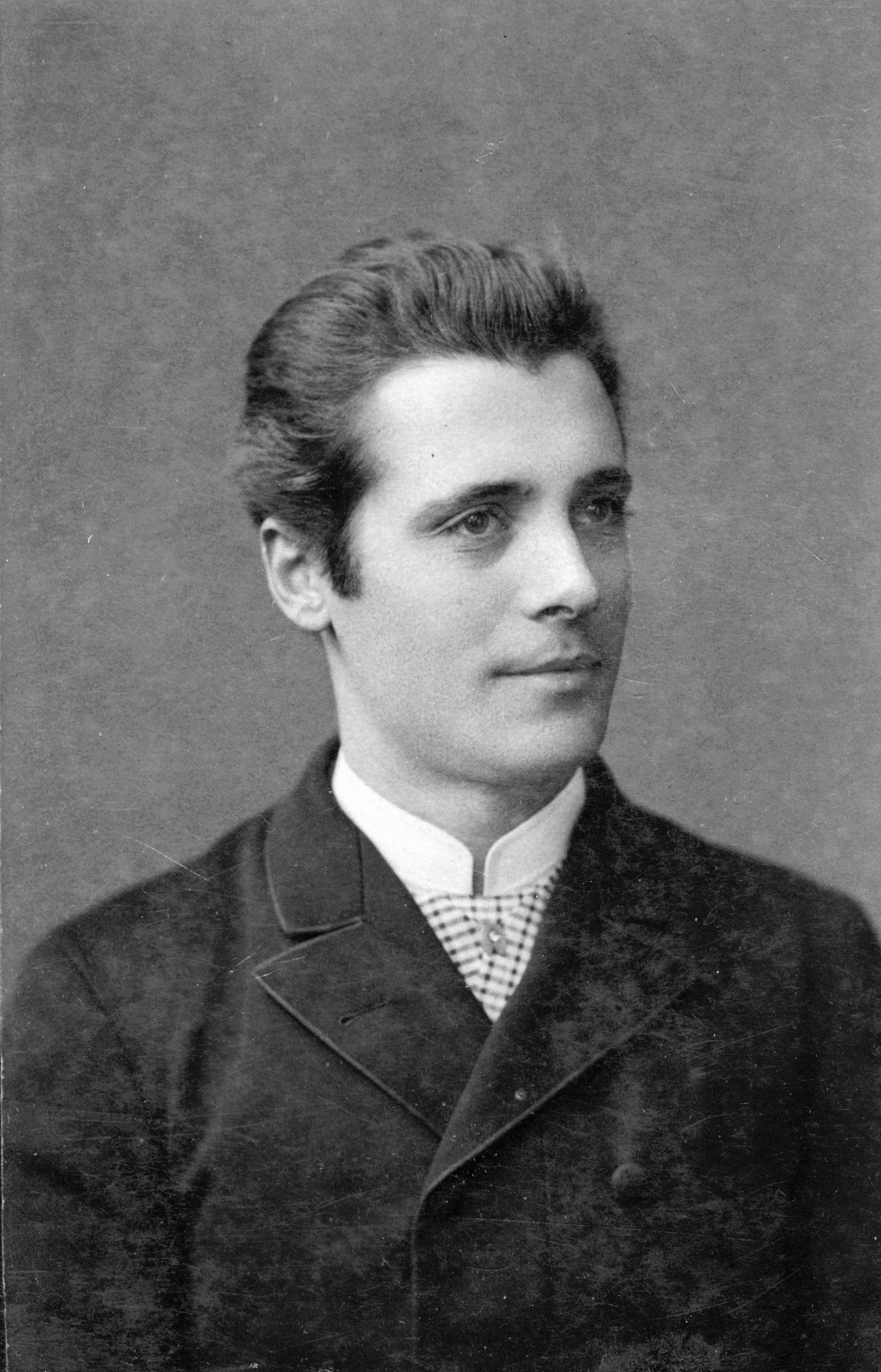 Axel Wesslau, skådespelare vid Fröbergska sällskapet 1889